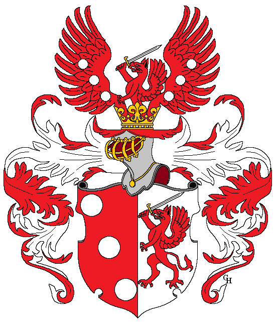 Wappen des Joseph von Streer (erhoben in den böhmischen Adelsstand 1743) aus Stříbro in Böhmen, verliehen anlässlich seiner Erhebung in den böhmischen Ritterstand mit dem Prädikat "von Streerowicz" 1748. Zeichnung von Gerd Hruška ( Für weitere Informationen zu dieser Standeserhebung siehe (